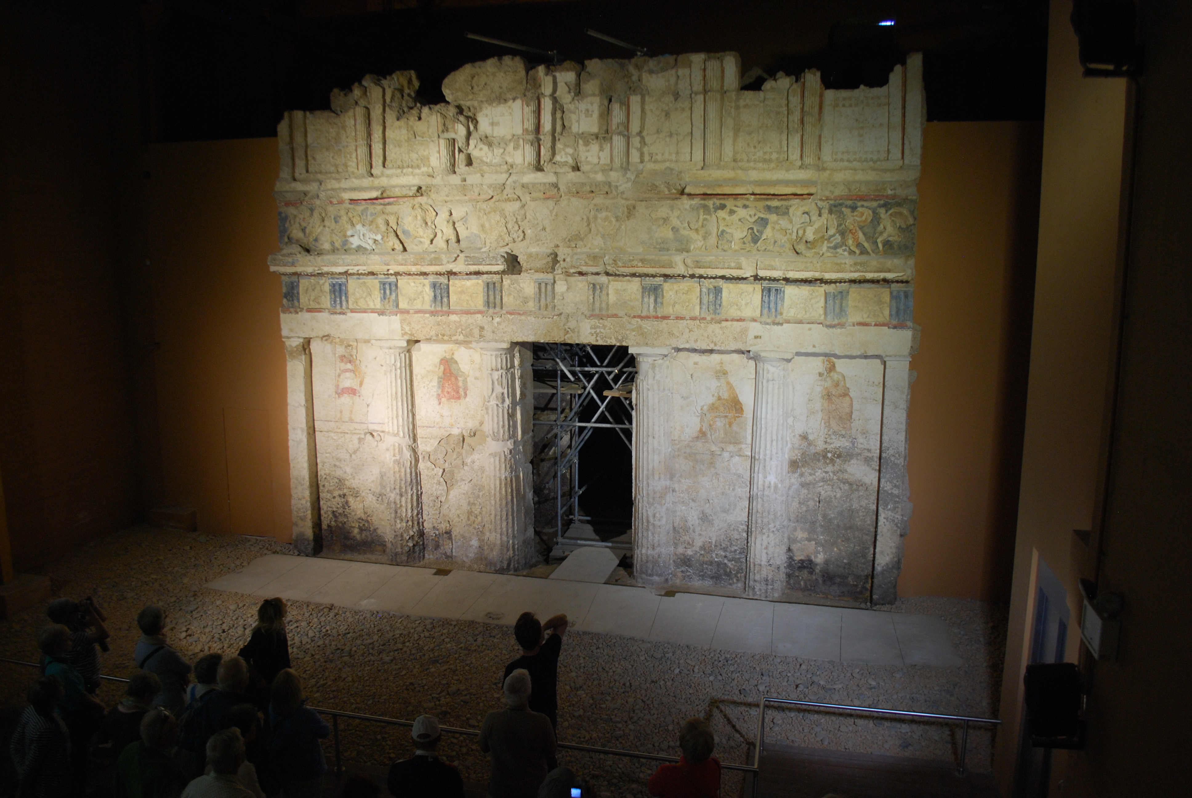 Vue des tombes macédoniennes de Mieza (Naousa).